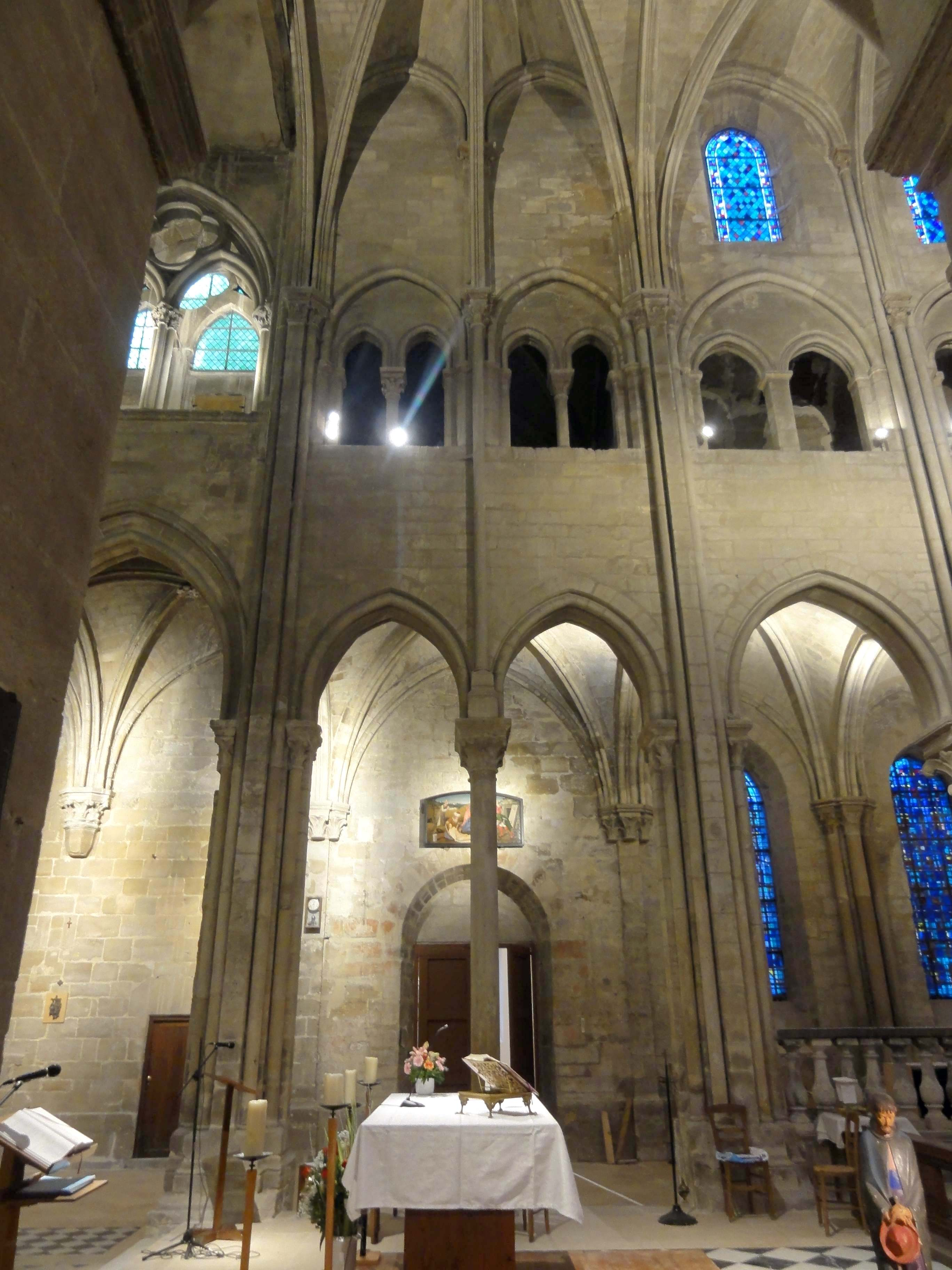 Intérieur de l'église - voir titre.